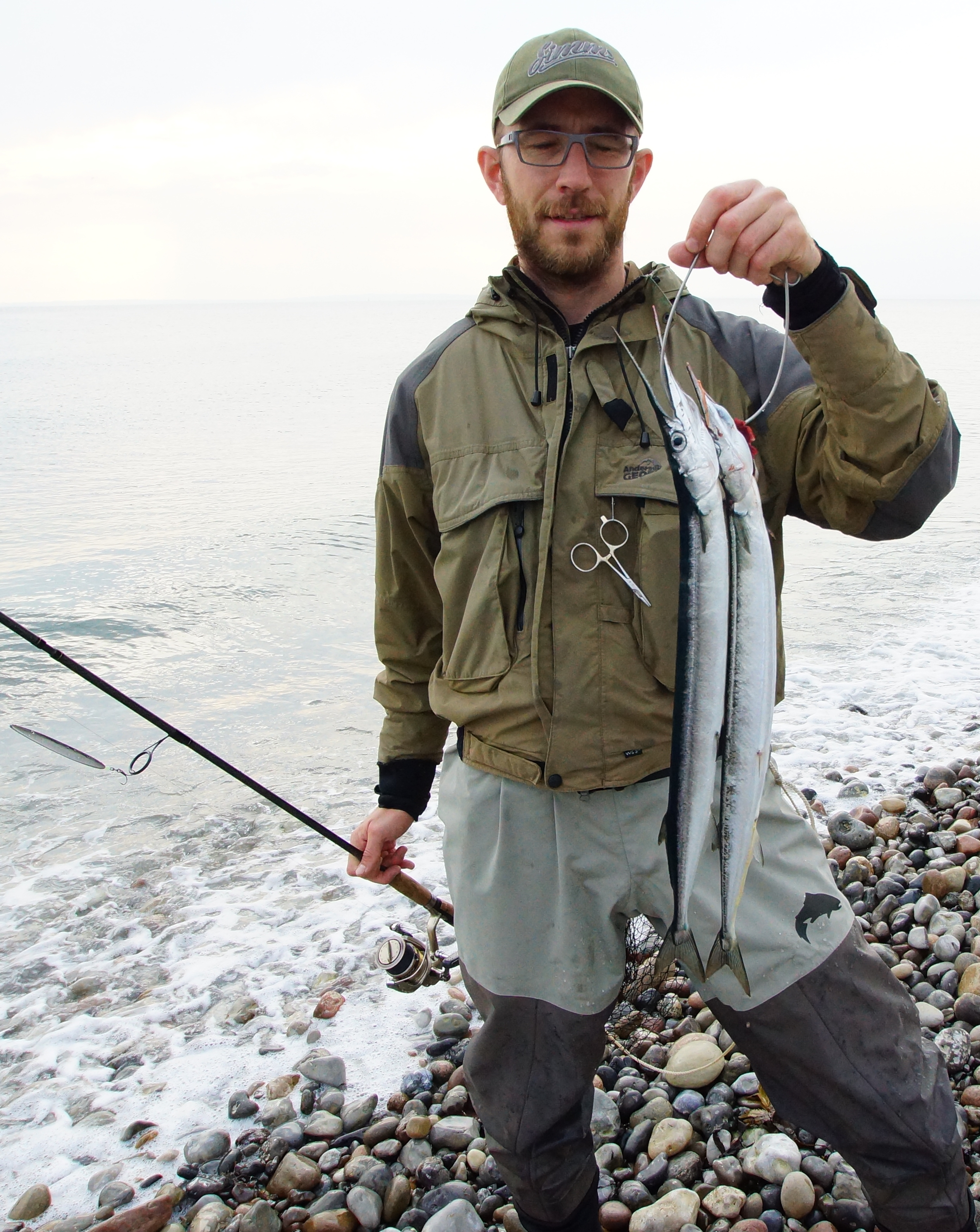 Sletterhage, lystfisker m. hornfisk